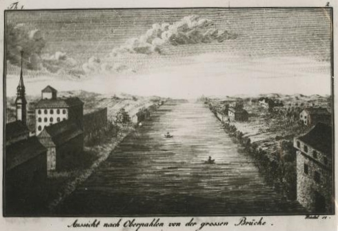 Vaade Põltsamaa sillalt Põltsamaa jõele. Vasakul Vana-Põltsamaa ning paremal Uue-Põltsamaa mõisasüdamed. Pilt Johann Christoph Petri raamatust "Neuestes Gemälde von Lief- und Ehstland..." (1809).